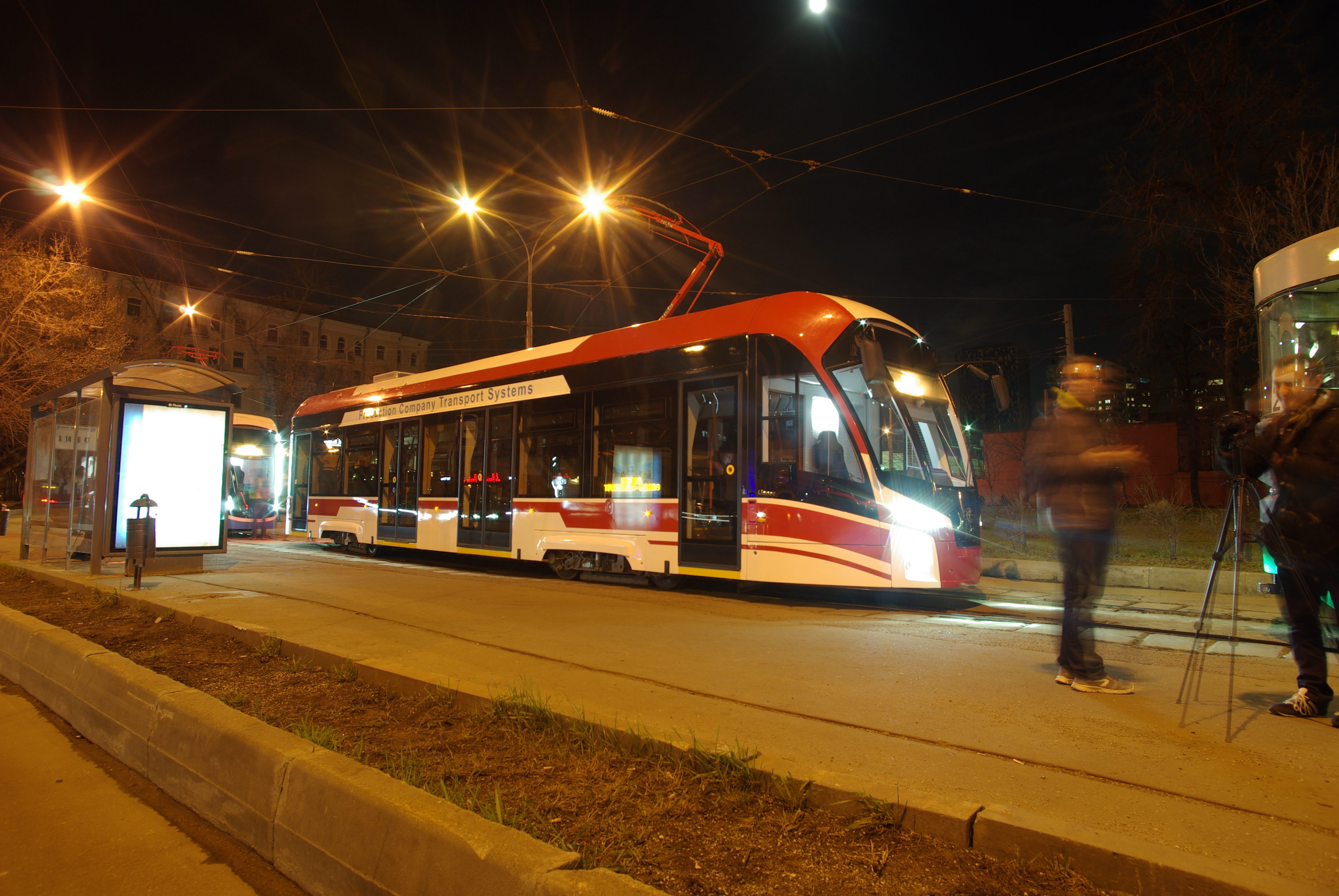 Tram parade 2019.